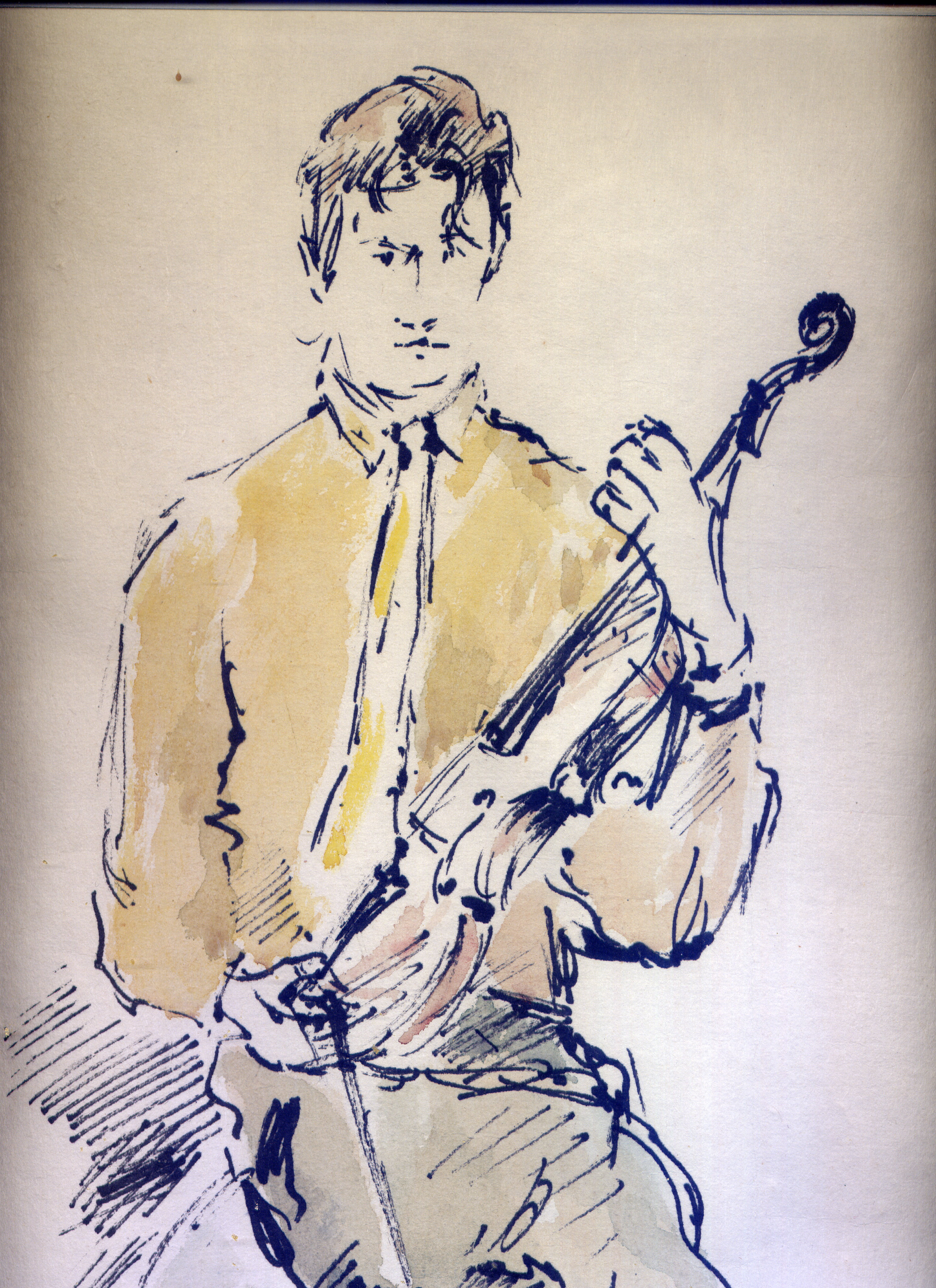 Portrait d'ALAIN VAN DIEVOET, par son père LEON VAN DIEVOET, 46 cm x 28 cm, dessin encre de chine et aquarelle sur papier japon, 1967